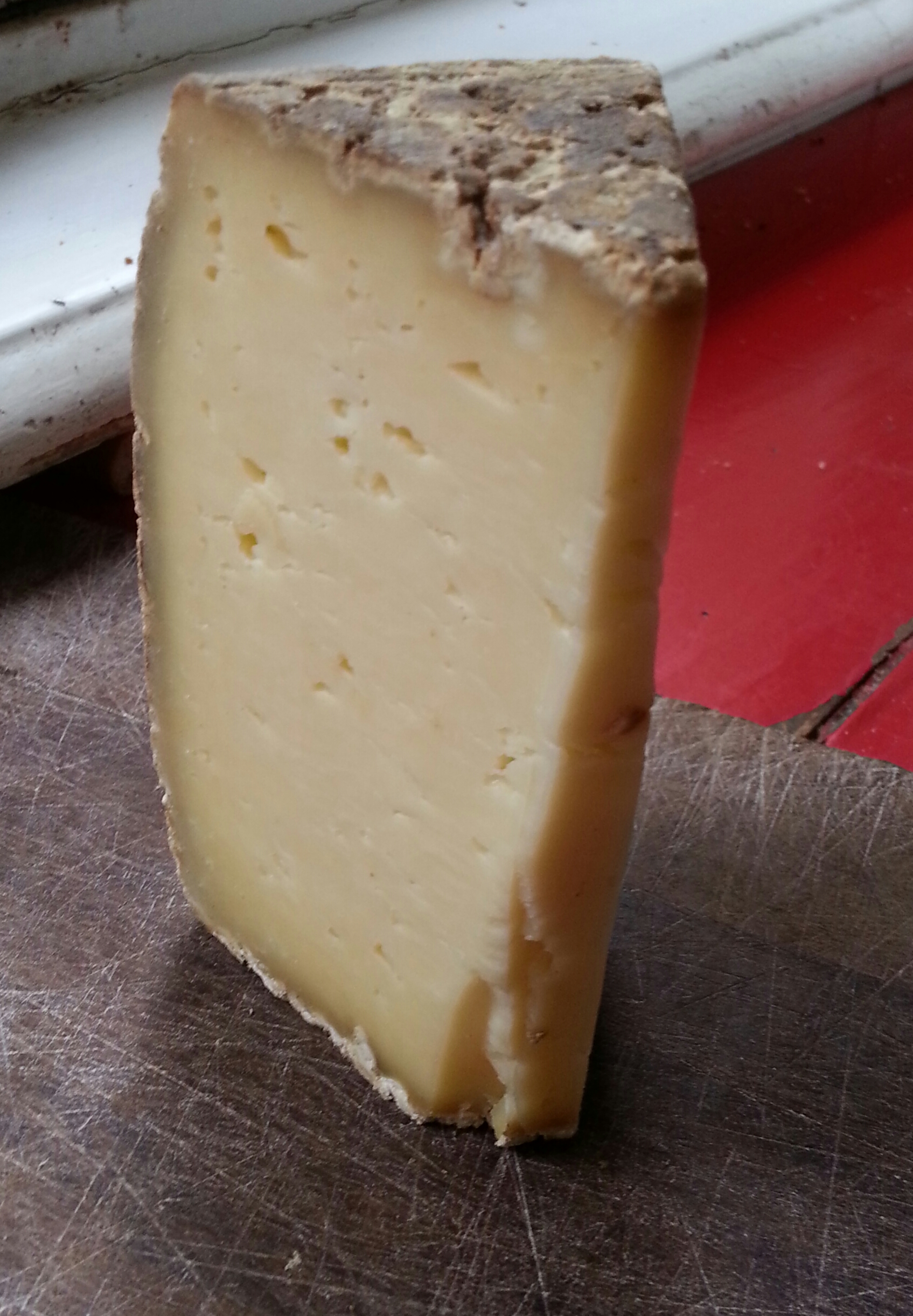 Fromage de marque Le Thérondels, propriété de la Coopérative Fromagère de Thérondels dans l'Aveyron en France. Pâte pressée non cuite au lait cru de vache.